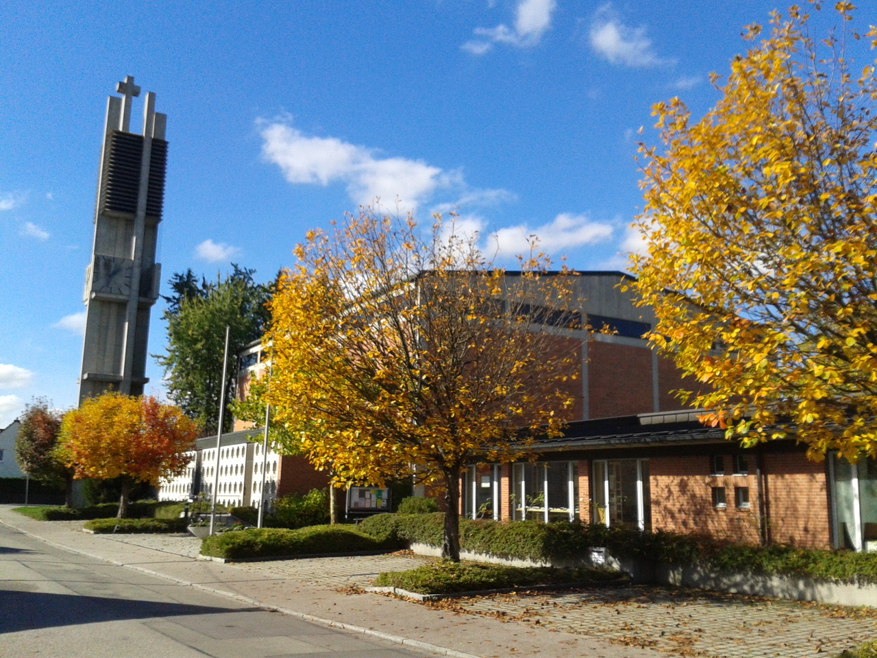 Pfarrkirche St. Vinzenz